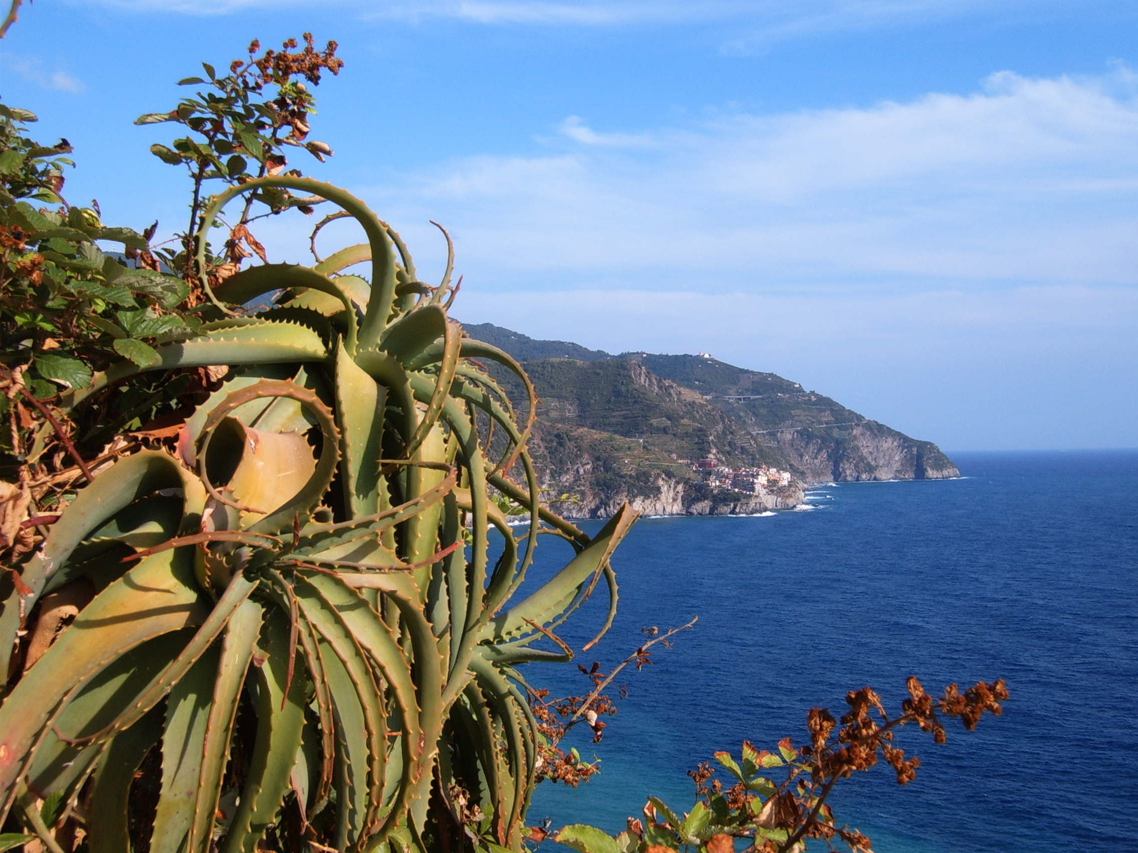 Vista da Corniglia, Cinque Terre (Italia)